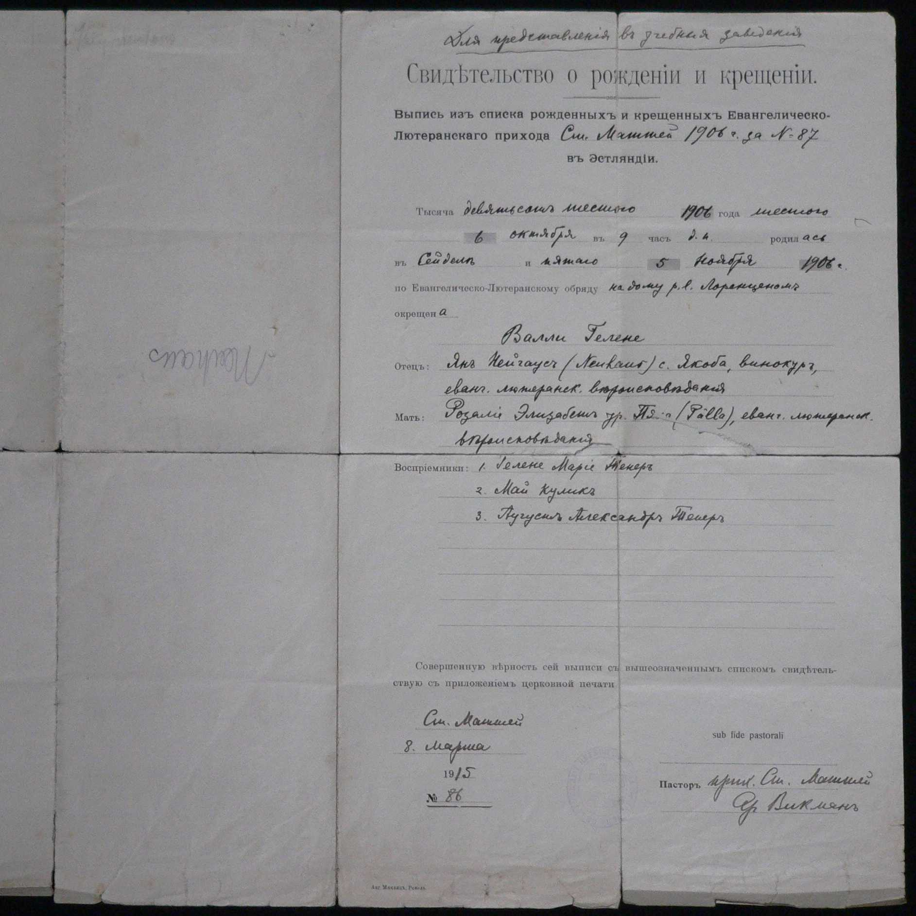 Arvo Elleri foto Valli dokumendist